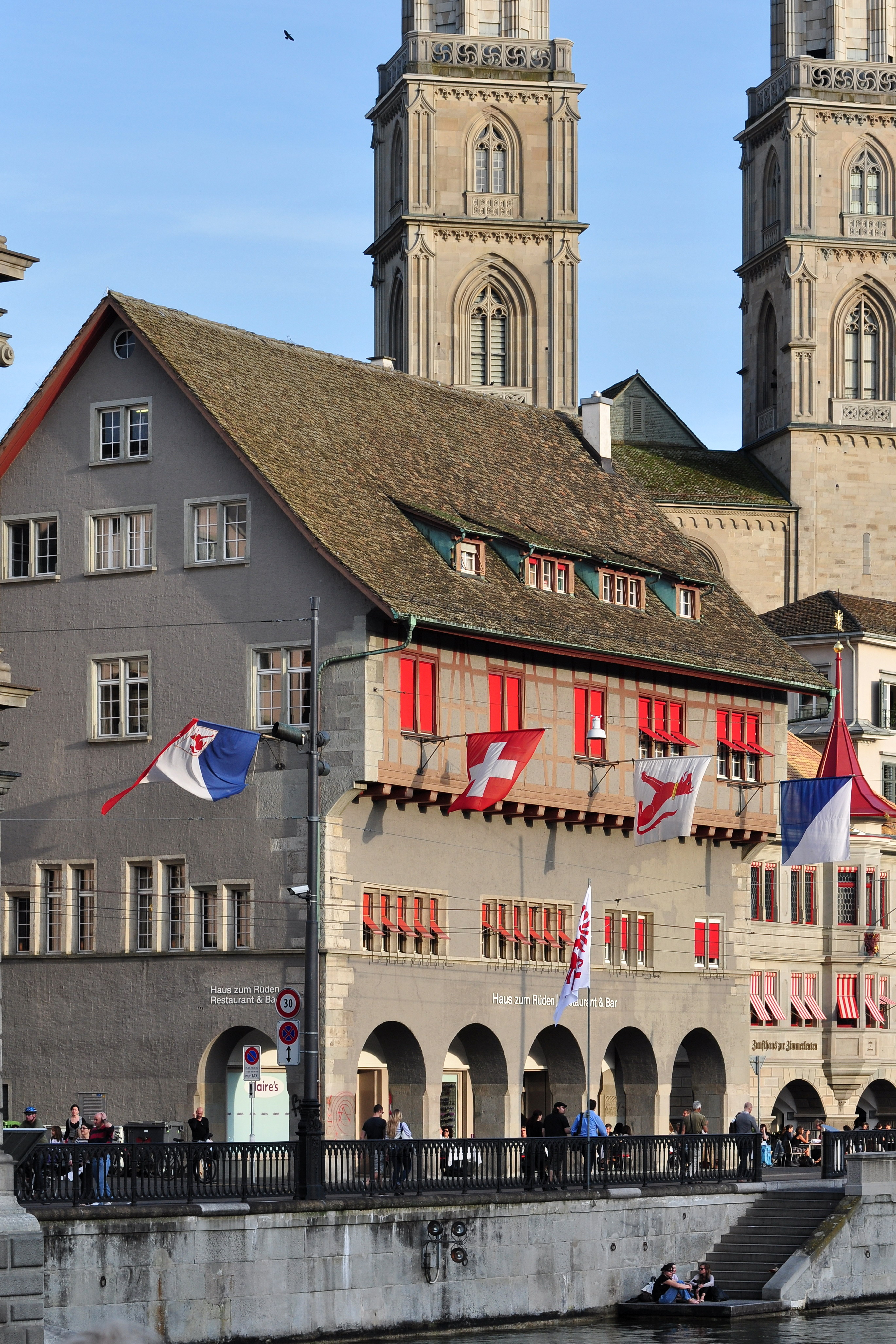 Haus zum Rüden of the Constaffel society at Limmatquai in Zürich (Switzerland), Grossmünster in the background.